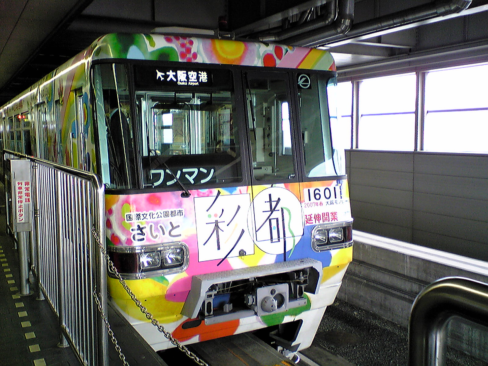 大阪高速鉄道万博記念公園駅にて撮影。彩都線ラッピング編成（01編成）。